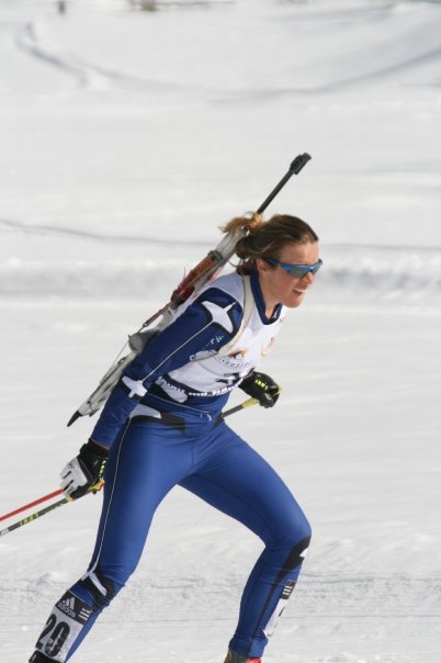 See Title